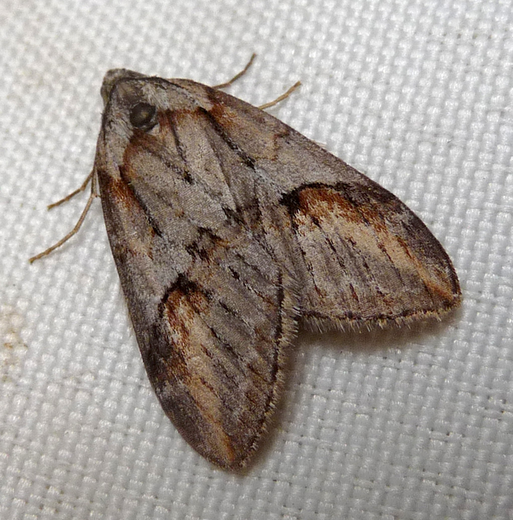 Chesias isabella. Geometridae